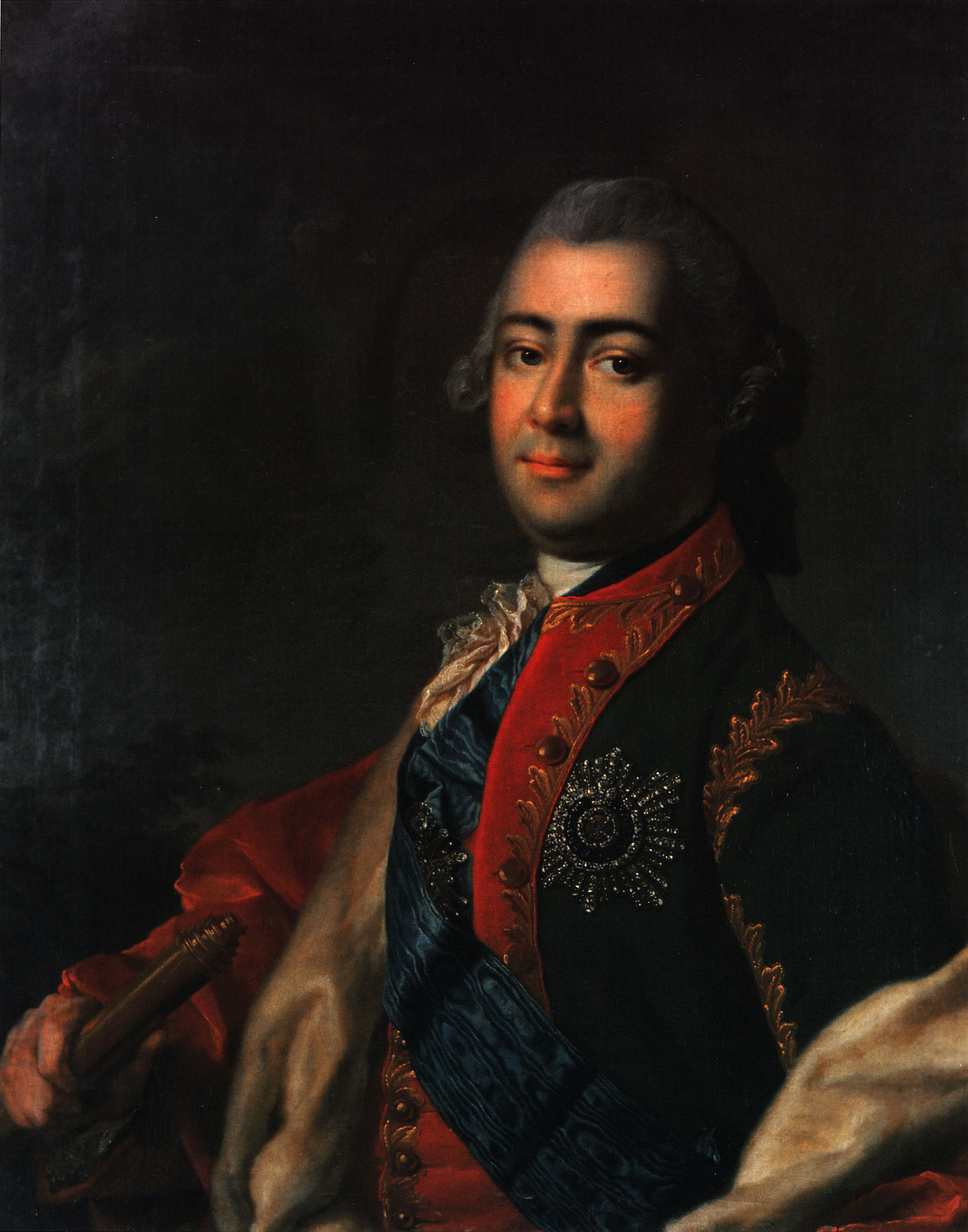 Портрет Алексея Григорьевича Разумовского